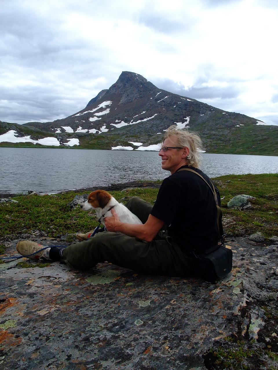 Båtfjellet tatt fra Sauvatn